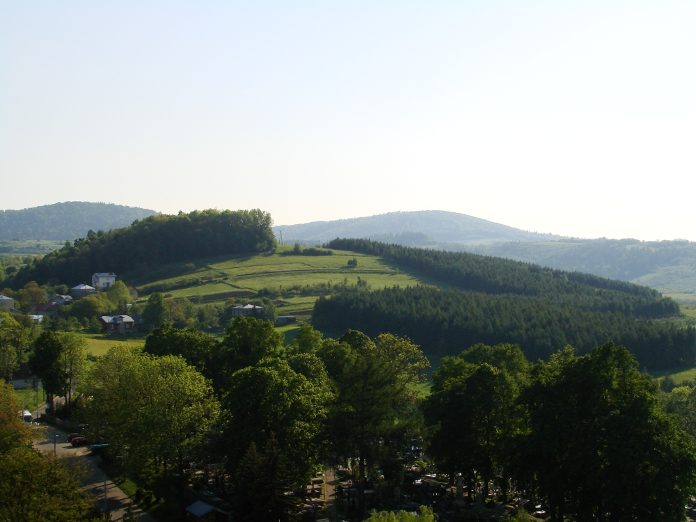 Góra Kalwaria - widok z wieży Kościoła w Rymanowie